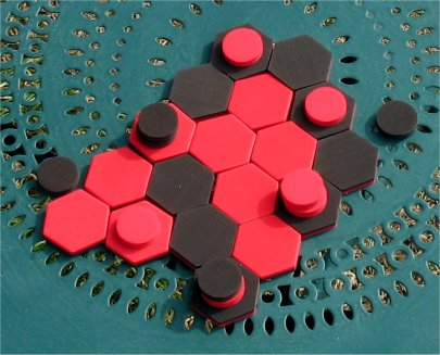 Jeu Exxit